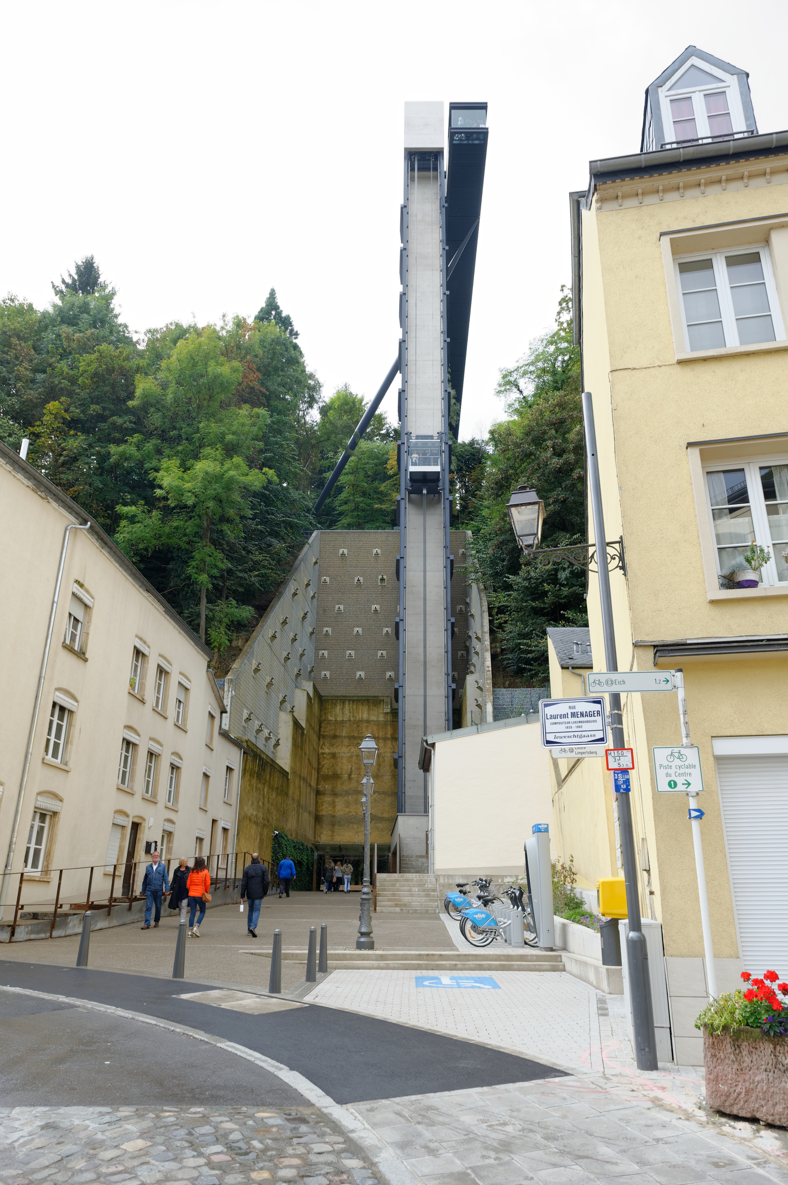 Fahrstuhl in Luxemburg Pfaffenthal